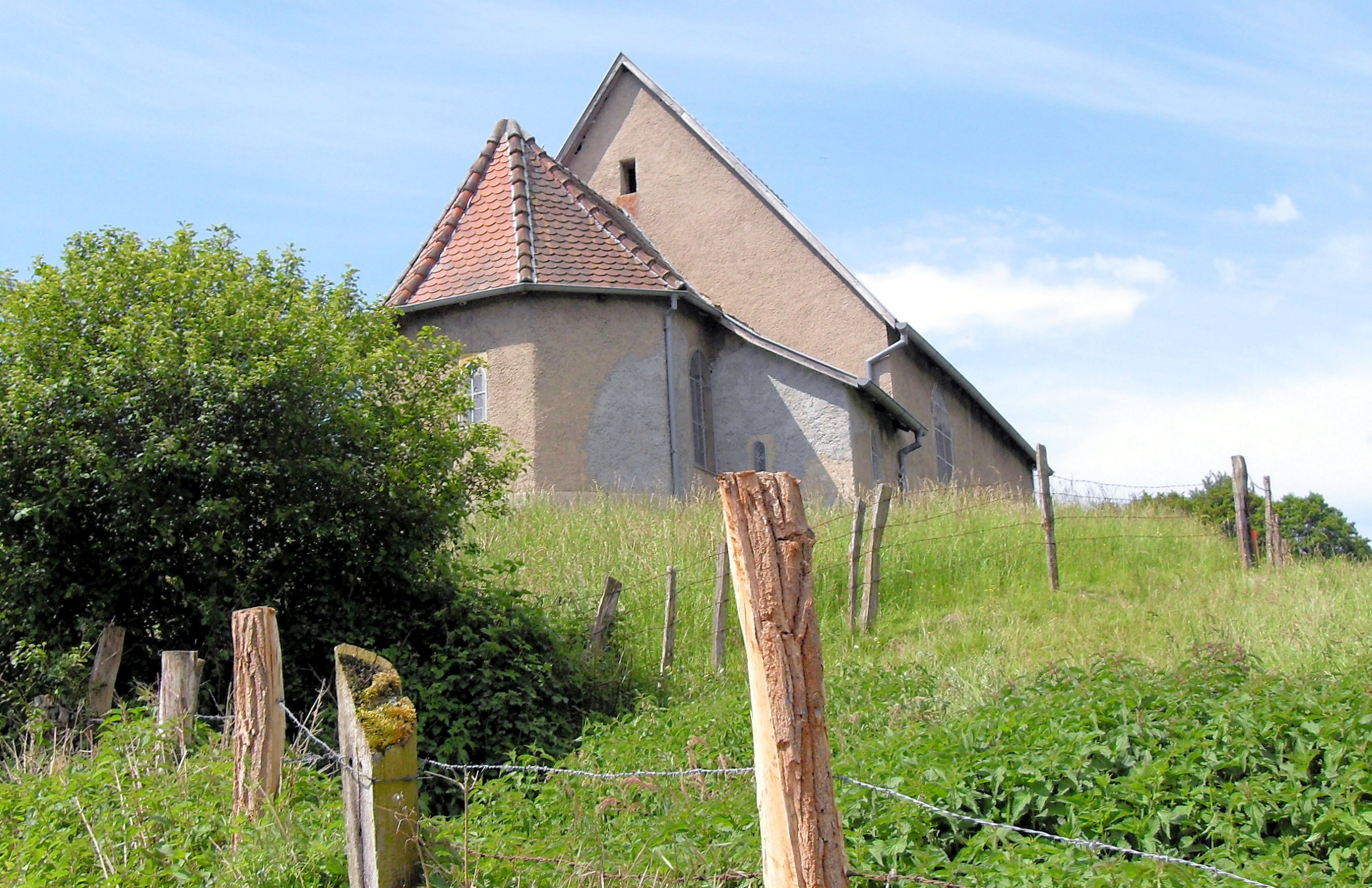 La chapelle Saint-Martin à Ballersdorf La chapelle actuelle serait le dernier vestige d'un village disparu: Mettersdorf voisin de Ballersdorf. Les deux villages ont étê décinés et détruits à plusieurs reprises durant la Guerre de Cents Ans